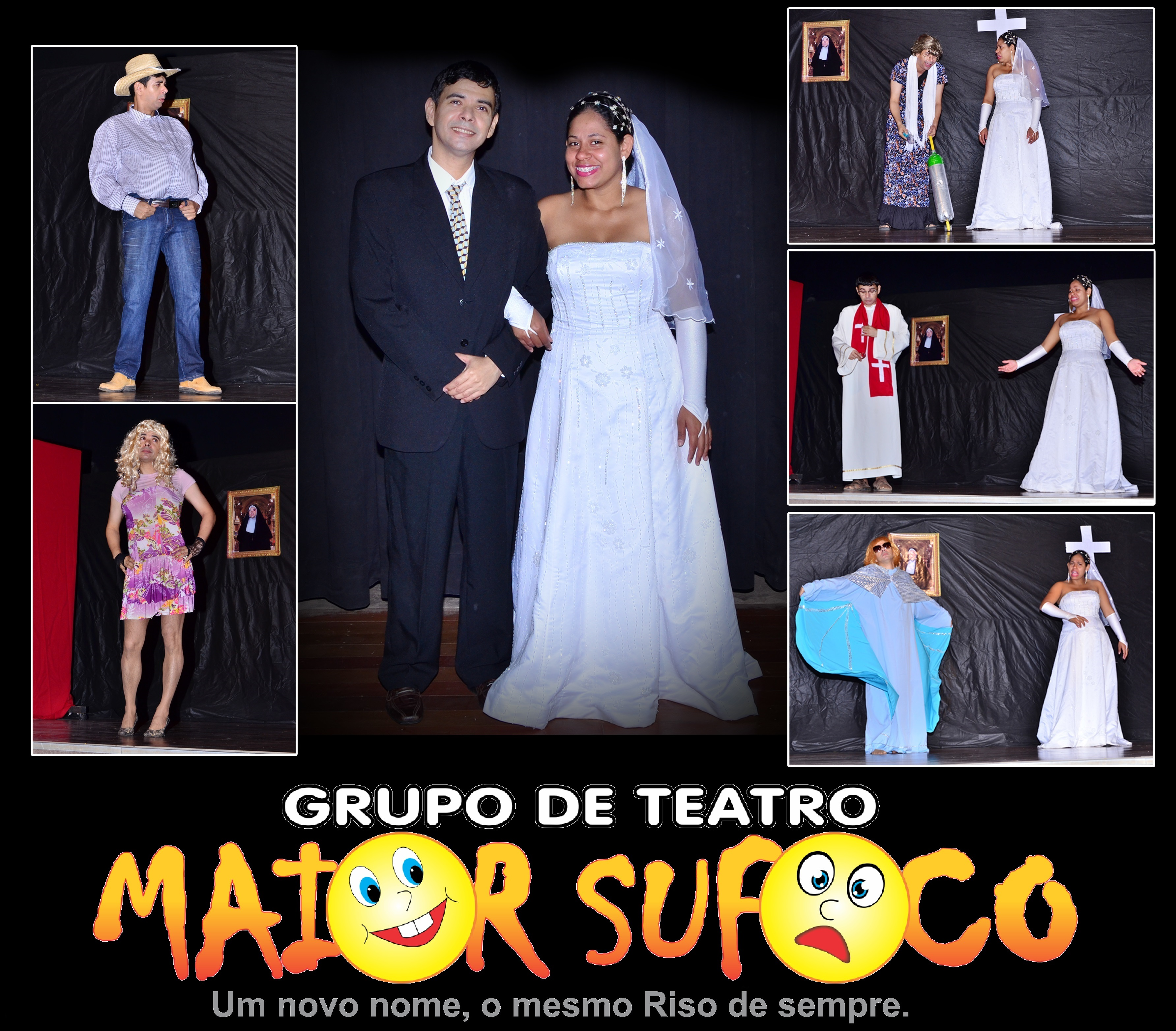 No elenco: Edimar Olic e Carina Andrade - Texto e Direção: Edimar Olic